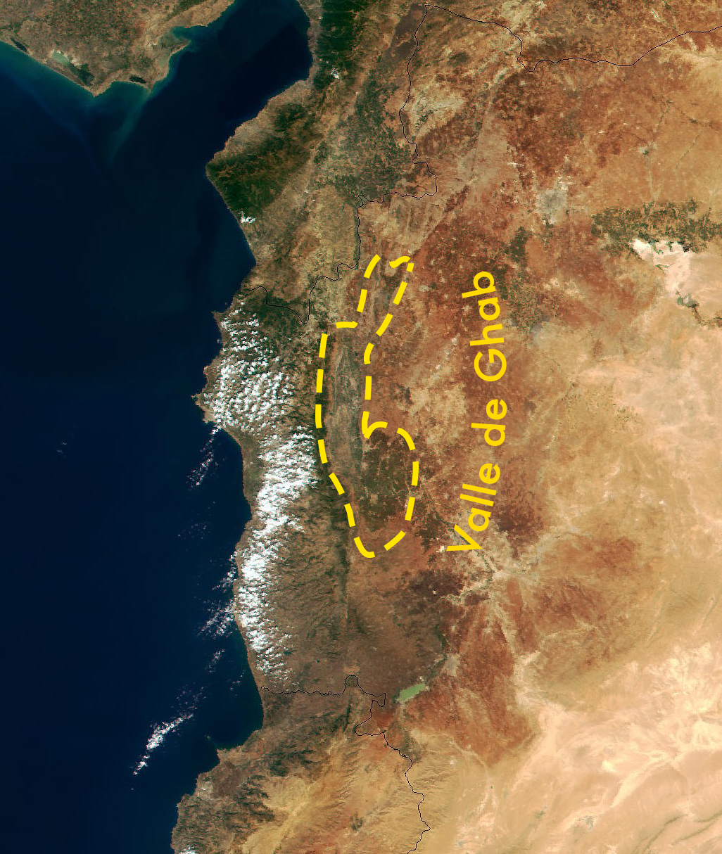 Localización en un mapa satelital del Valle de Ghab